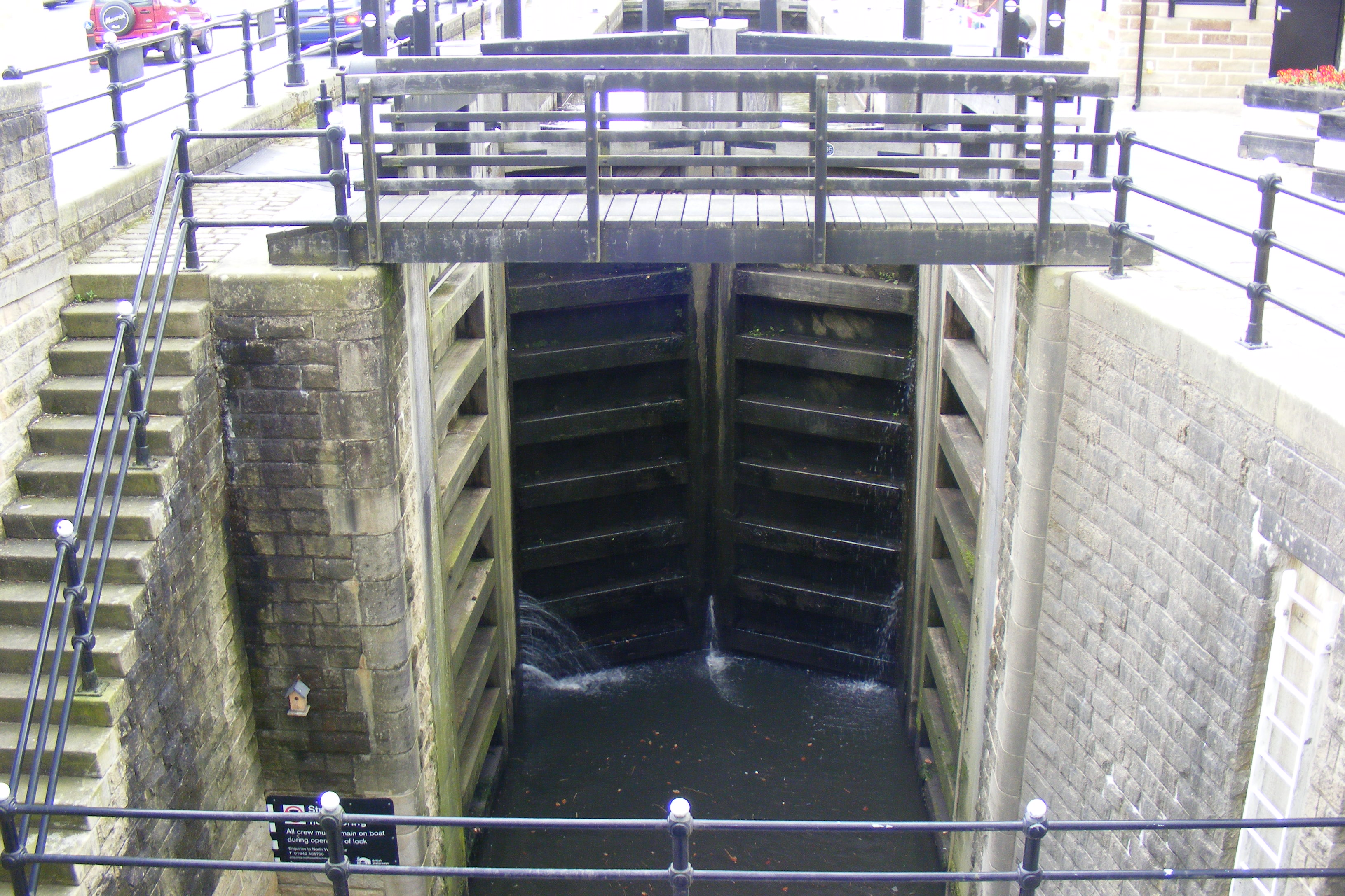 Tuel Lane Lock